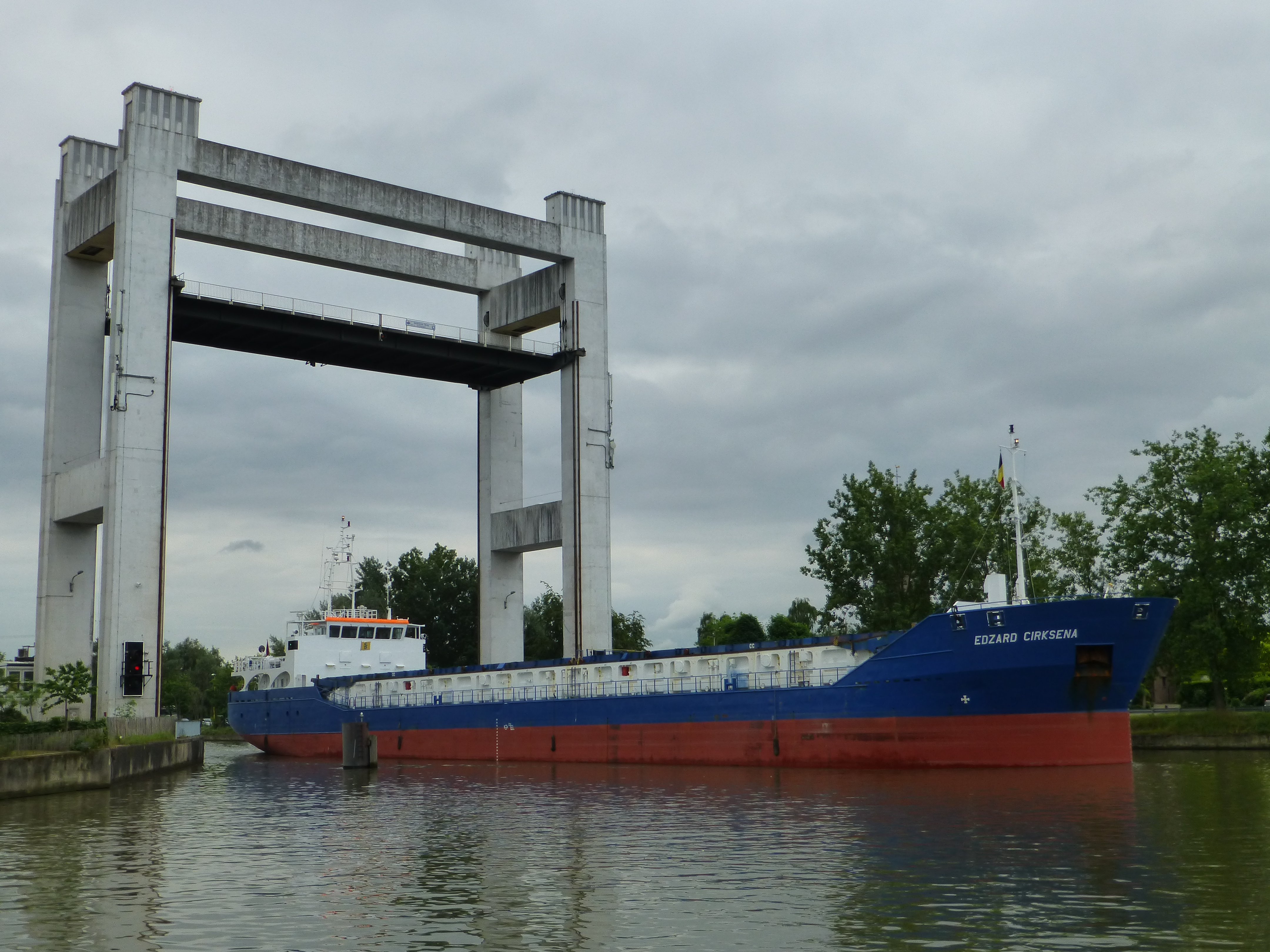 Verbrande Brug over het Zeekanaal Brussel-Schelde in Grimbergen geopend voor een zeeschip.